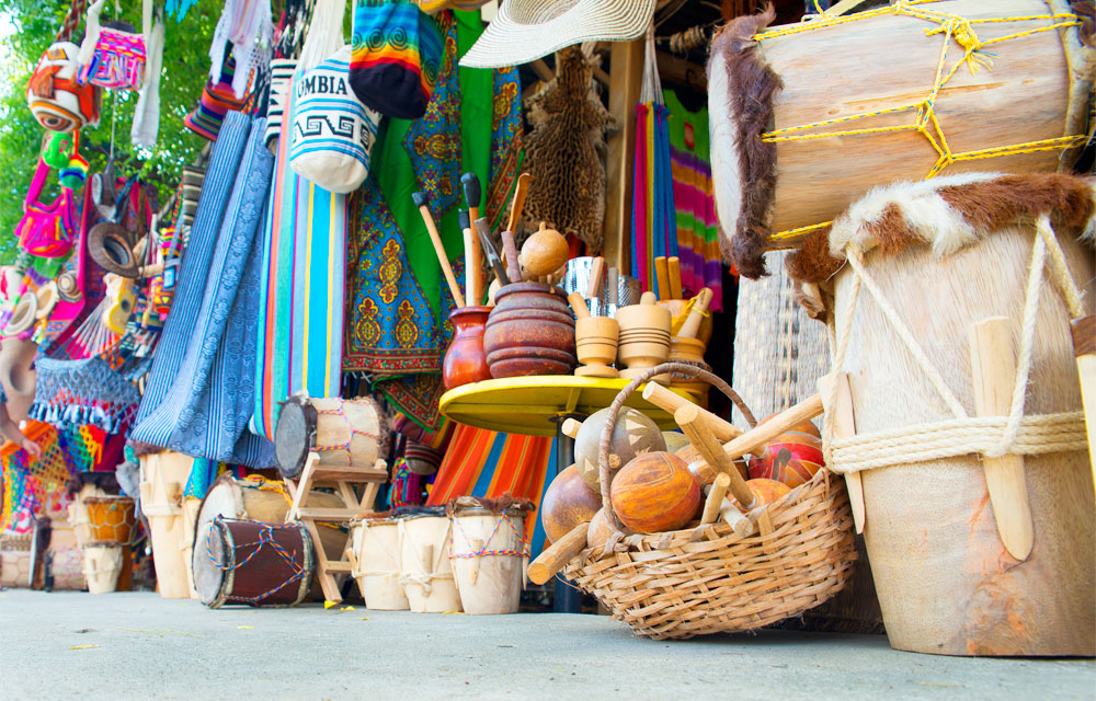 artesania